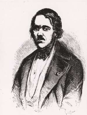 Portrait of Francis de Laporte de Castelnau